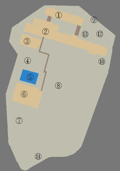 高槻市立第二中学校 校舎配置図